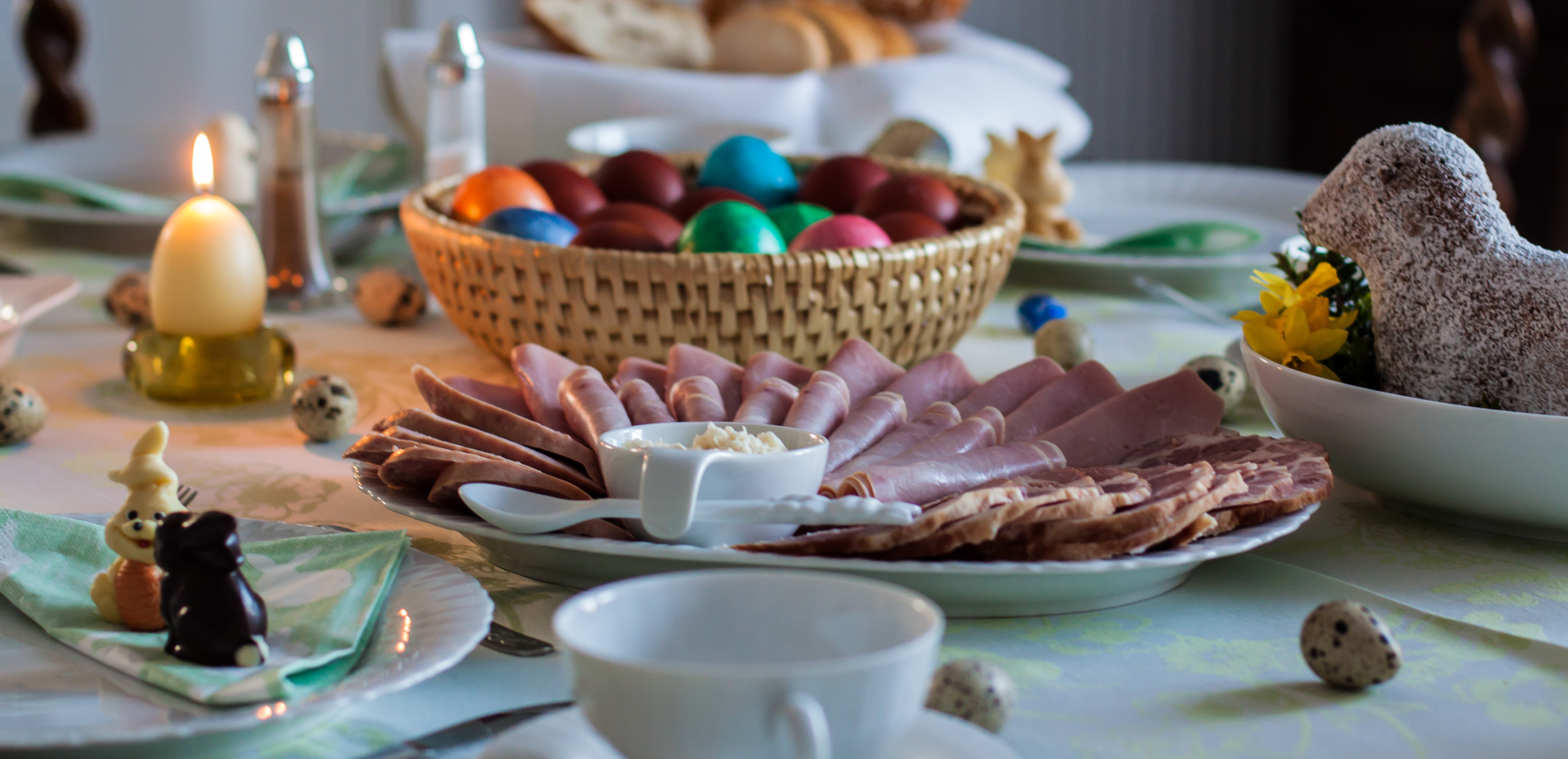 Der gedeckte Tisch lädt ein zum gemütlichen Frühstück mit Meerrettich, Süßem Brot, Osterlämmchen, Ostereiern und deftiger Wurst.